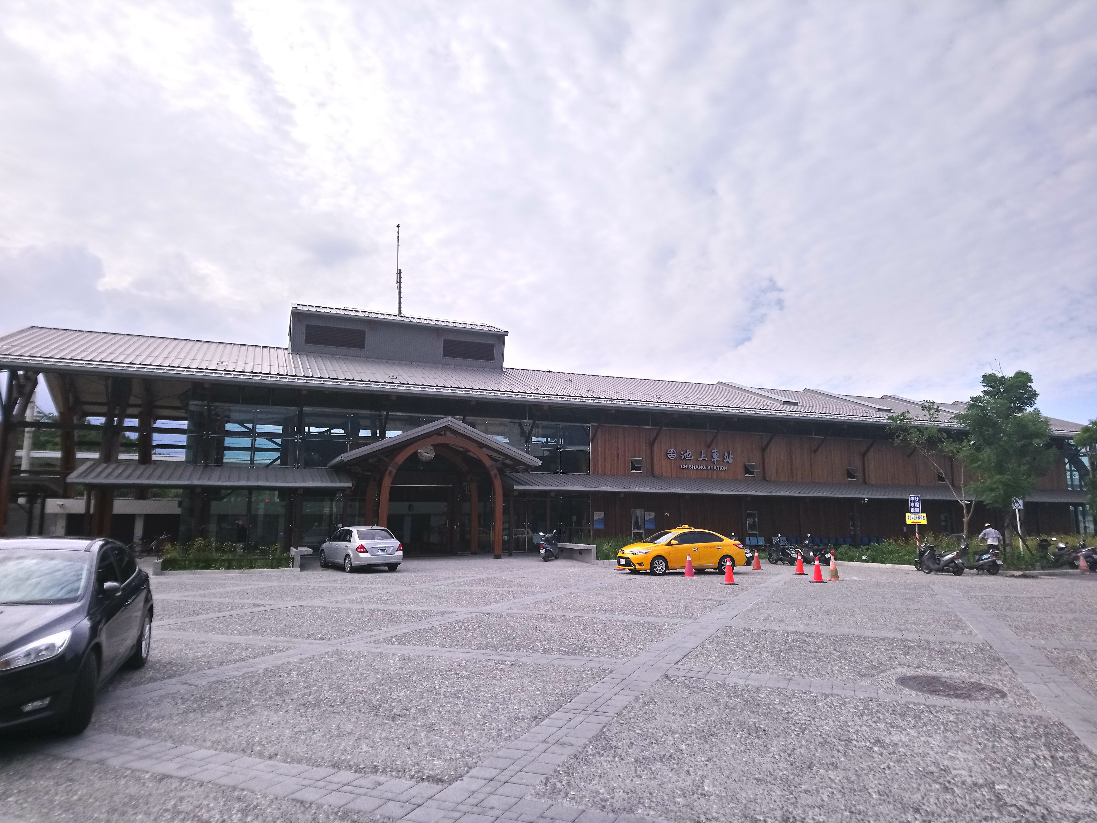 2016年改建完成的池上車站